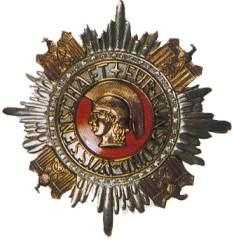 Deutscher Nationalpreis für Kunst und Wissenschaft - höchste Friedensauszeichnung des nationalsozialistischen Deutschen Reiches. Er wurde 1937 durch Adolf Hitler gestiftet und sollte an die Stelle des Nobelpreises treten, den anzunehmen Hitler – als Reaktion auf die Verleihung des Friedensnobelpreises an Carl von Ossietzky 1936 – „für alle Zukunft Deutschen“ untersagte.